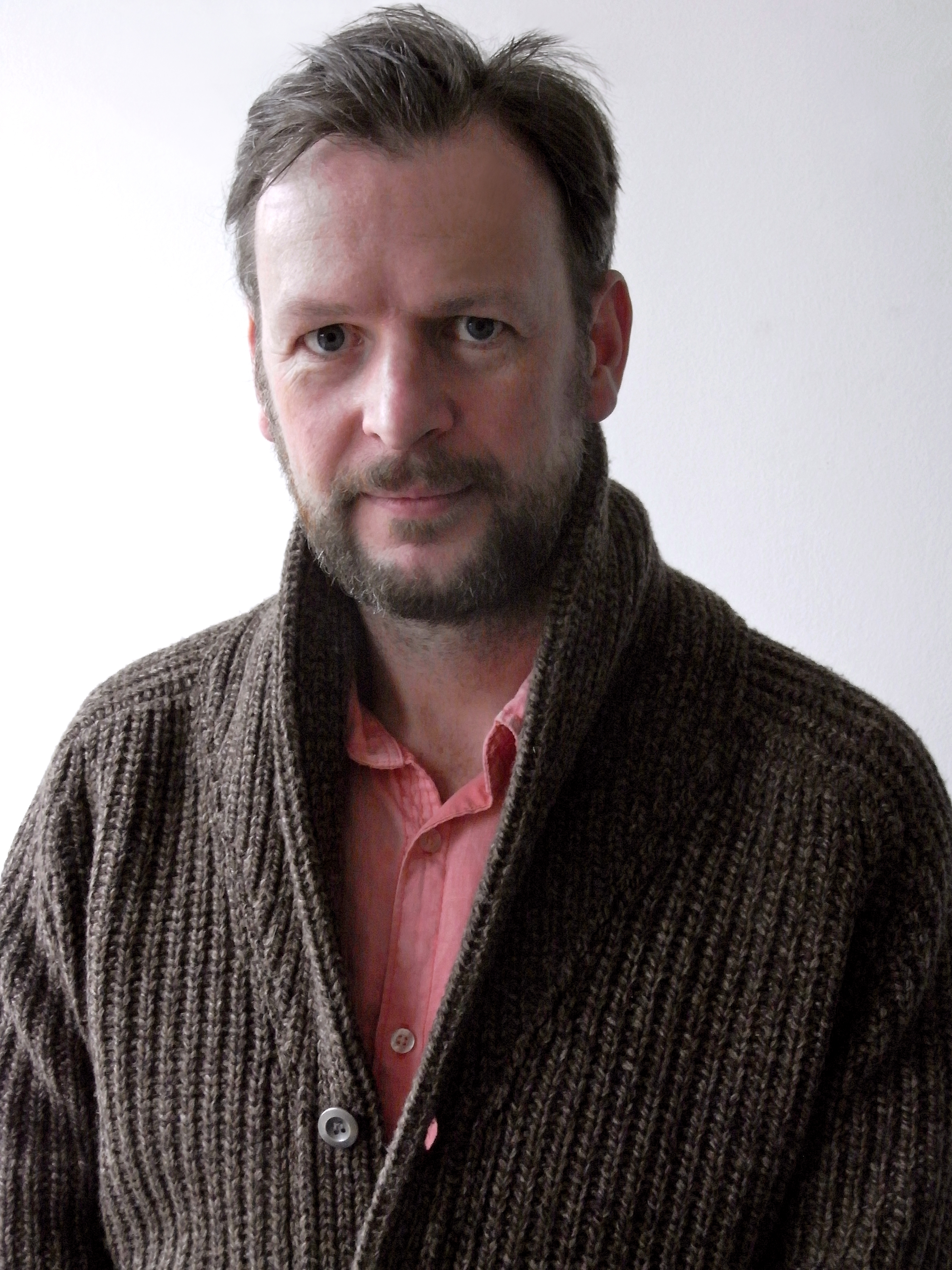 AndreasBuetow